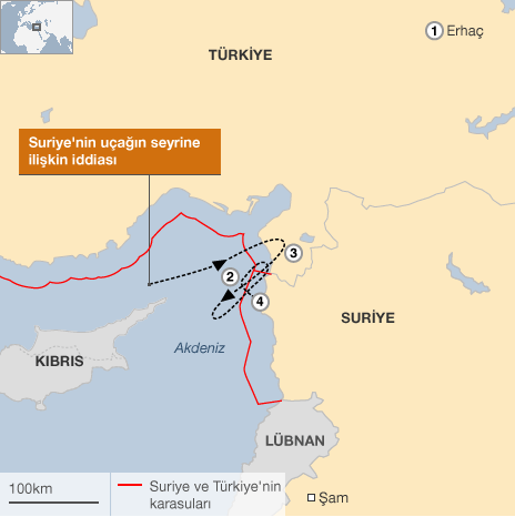 Haziran 2012'de vurulan Türk uçağının Suriye tarafından iddia edilen rotası. (File:Syrian Uprising Map of Homs Neighborhoods.png göz önüne alınarak yüklendi.)